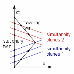 Minkowski diagram of the twin paradox